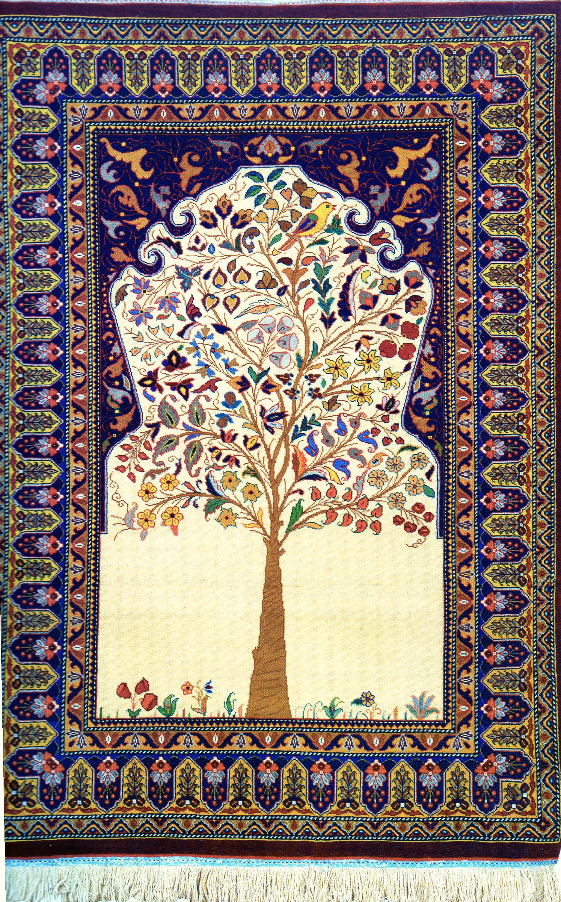 Ковер "Агаджлы", 1974 год. Азербайджанский государственный музей ковра и народно-прикладного искусства, Баку.